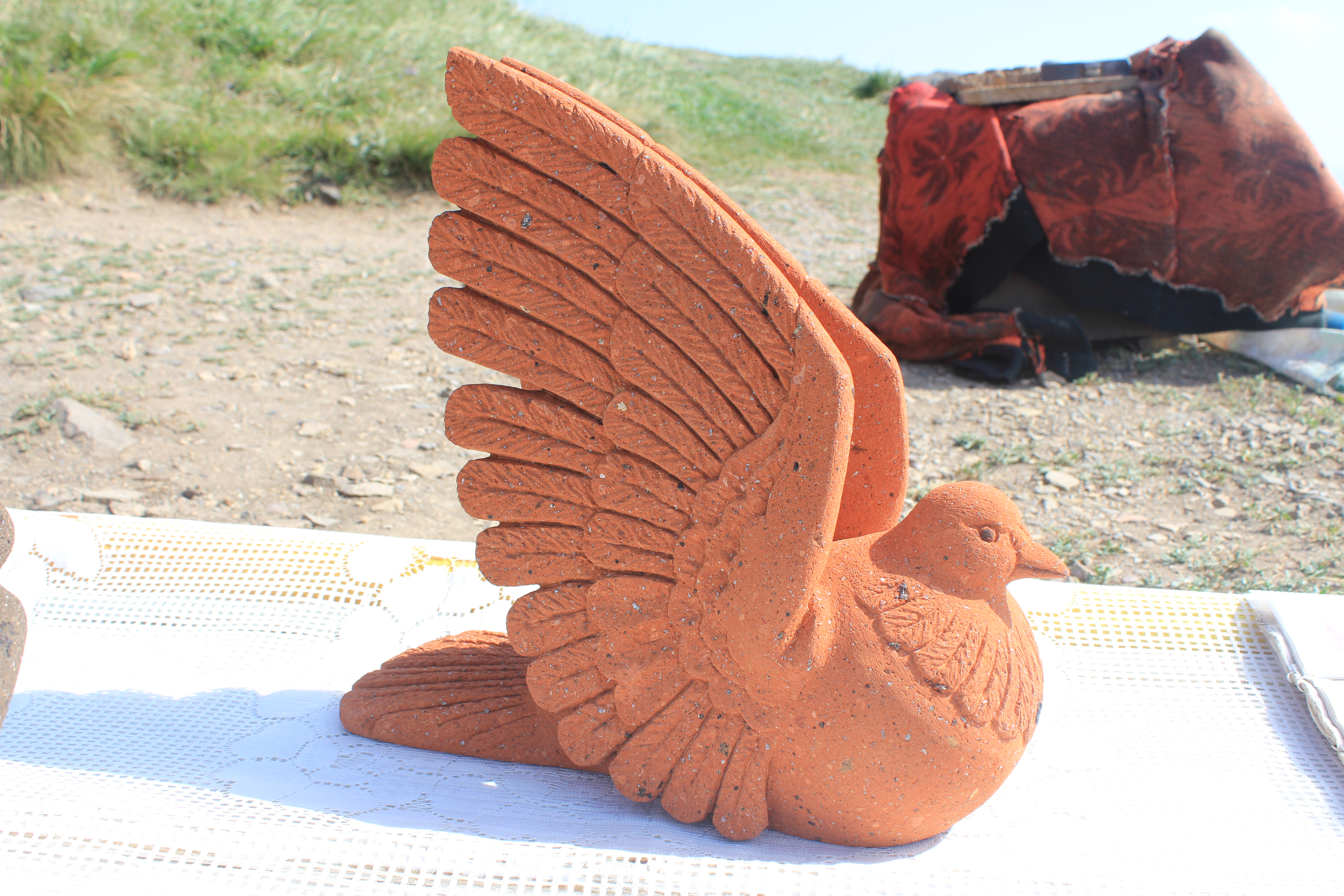 Поделка из туфа, Севанский полуостров, 2012 год